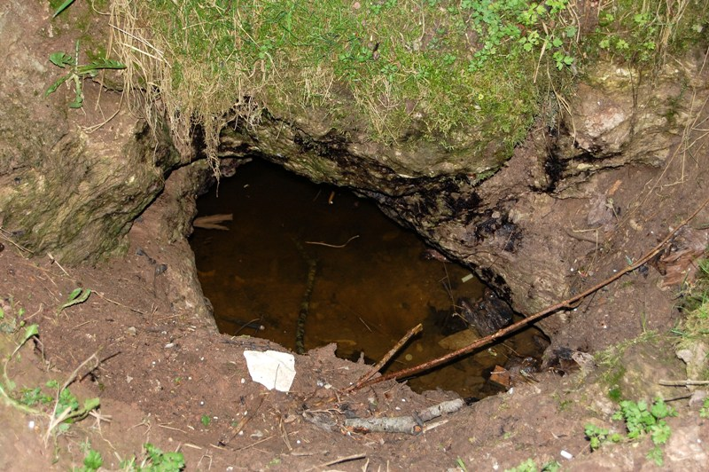 Karvės Ola – karstinė smegduobė su ola, esanti Karajimiškio kaime (Biržų rajonas), Biržų regioniniame parke